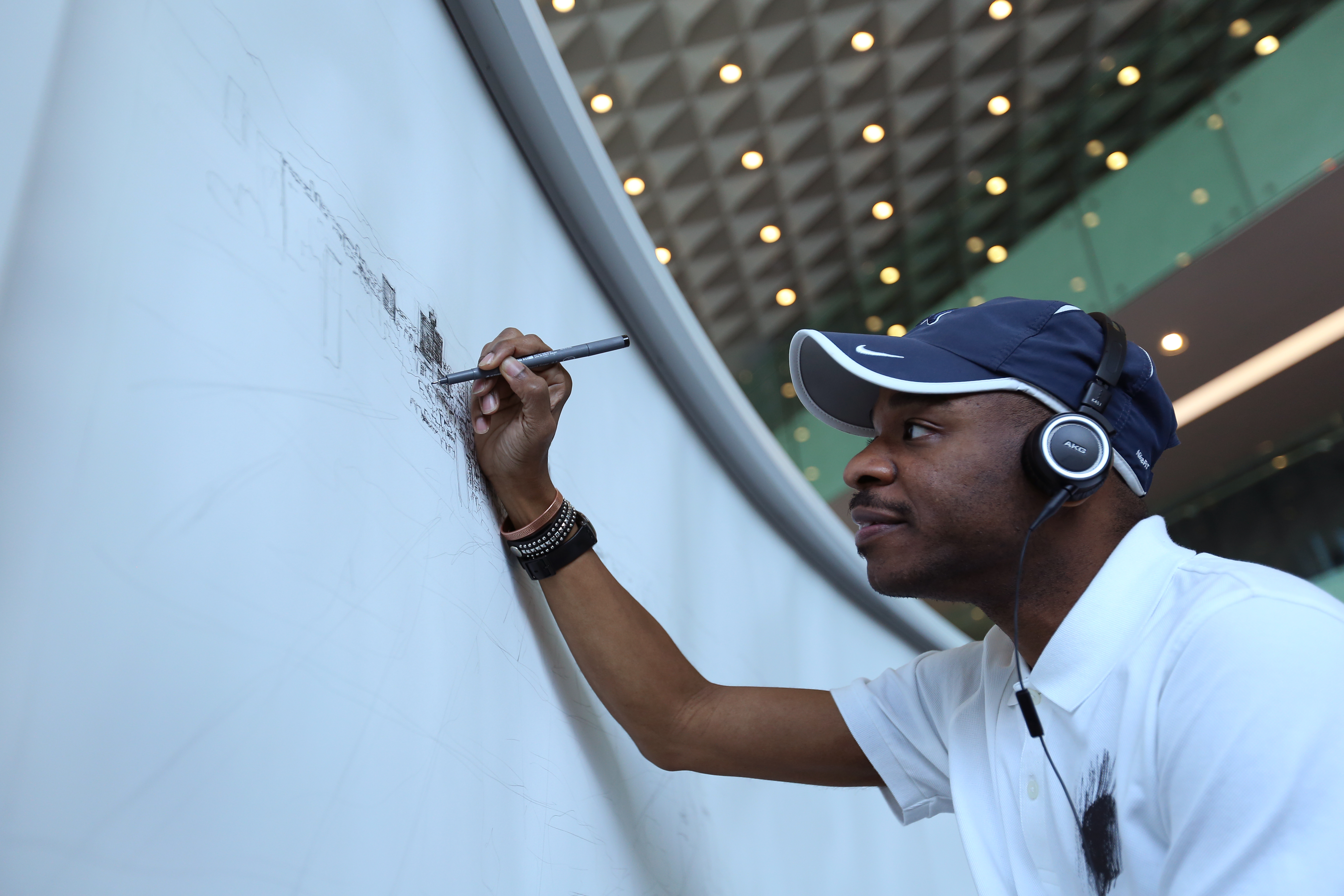 Stephen Wiltshire dibujando un paisaje de la Ciudad de México